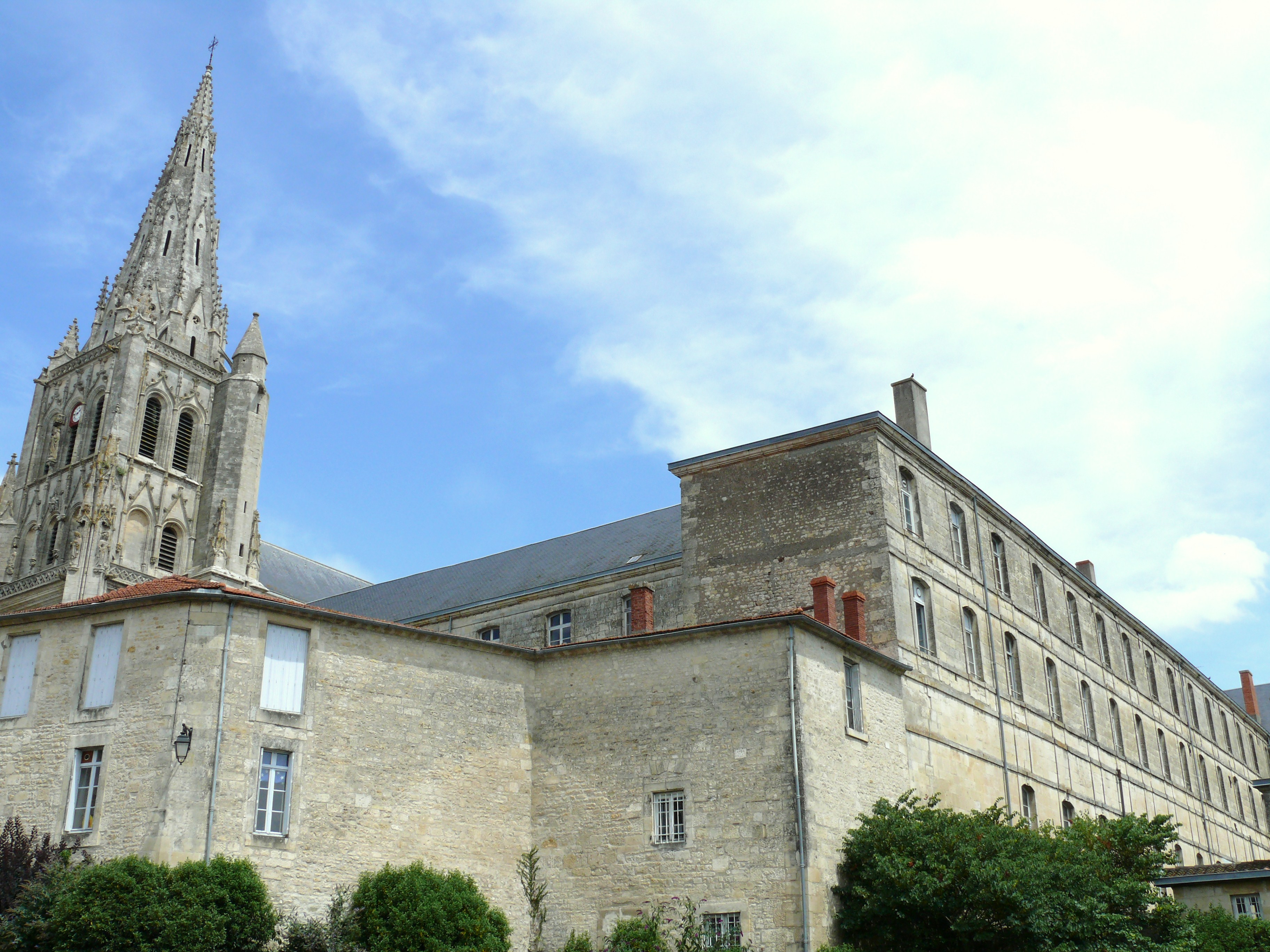 Saint-Maixent-l'Ecole - Bâtiments de l'abbaye